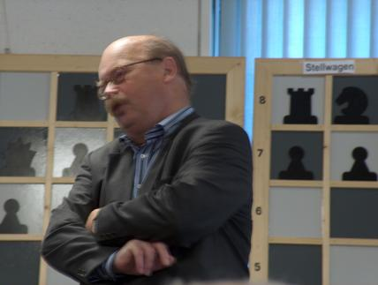 Eigen foto (okt. 2004)